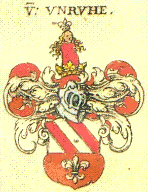 Wappen der Bayerischen Adelsfamilie Unruh.